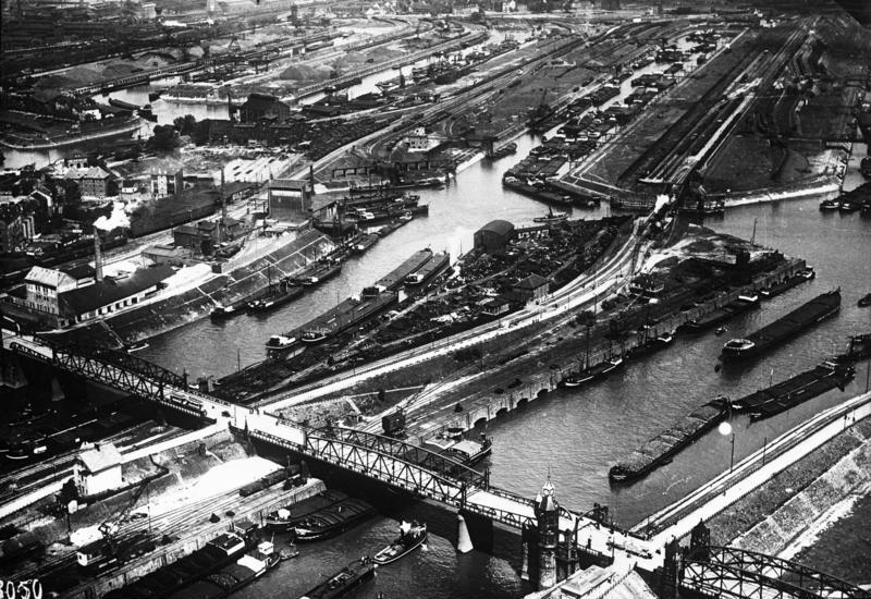 Blick auf den grössten Binnenhafen der Welt in Duisburg mit der durch die grosse Wirtschaftskrise stilliegenden Schiffahrt. [Text von Bild 102-12562]